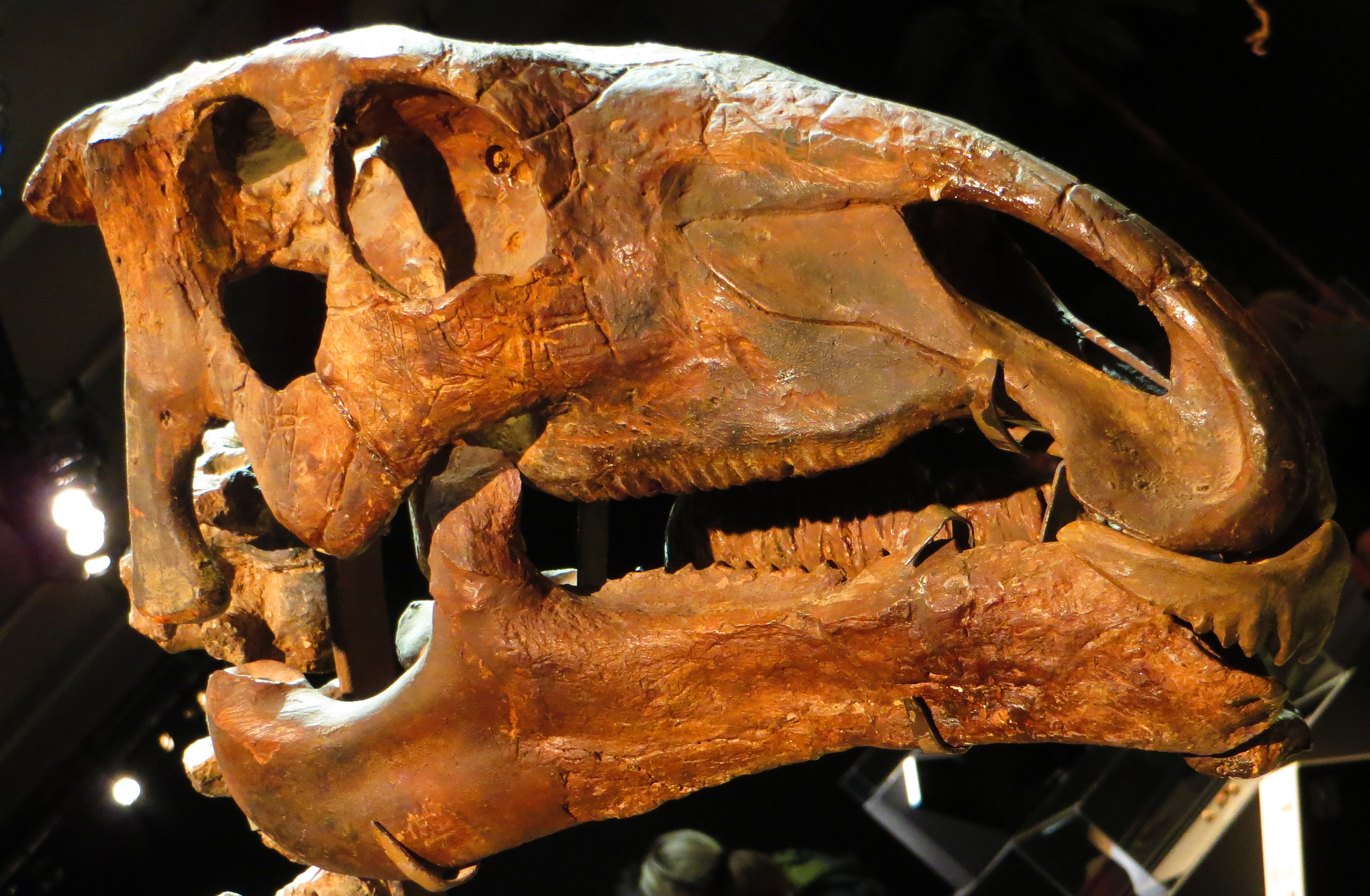 Fossil of Probactrosaurus, an extinct reptile- Took the picture at Dinosaurium, Prague